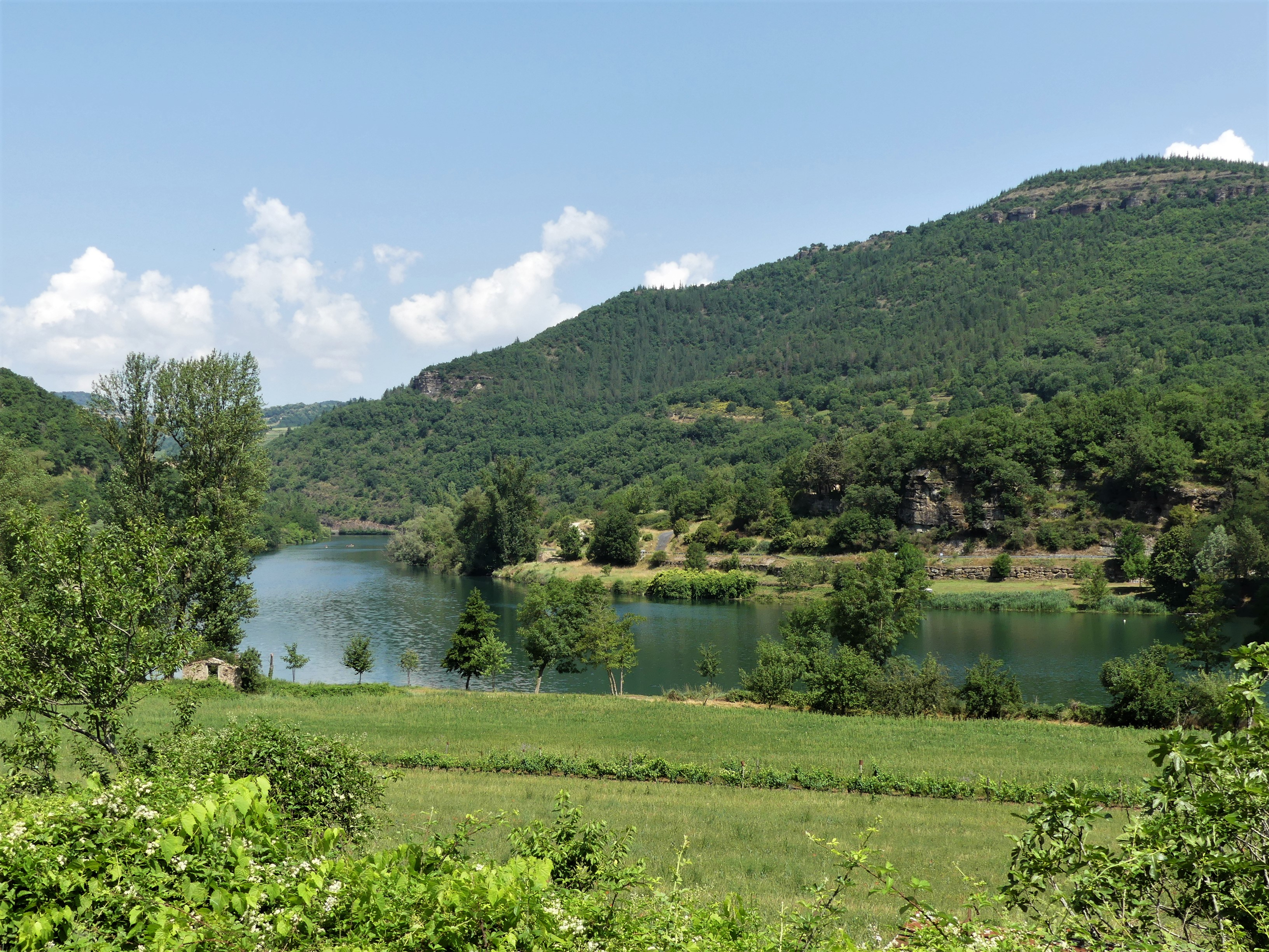 Le Tarn dans la retenue du barrage de Pinet, lieu-dit le Piala, Saint-Rome-de-Tarn, Aveyron, France.